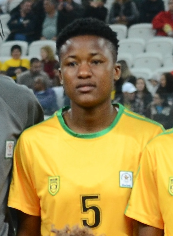 São Paulo - Seleções femininas do Zimbábue e da Alemanha se enfrentam na Arena Corinthians (Rovena Rosa/Agência Brasil)